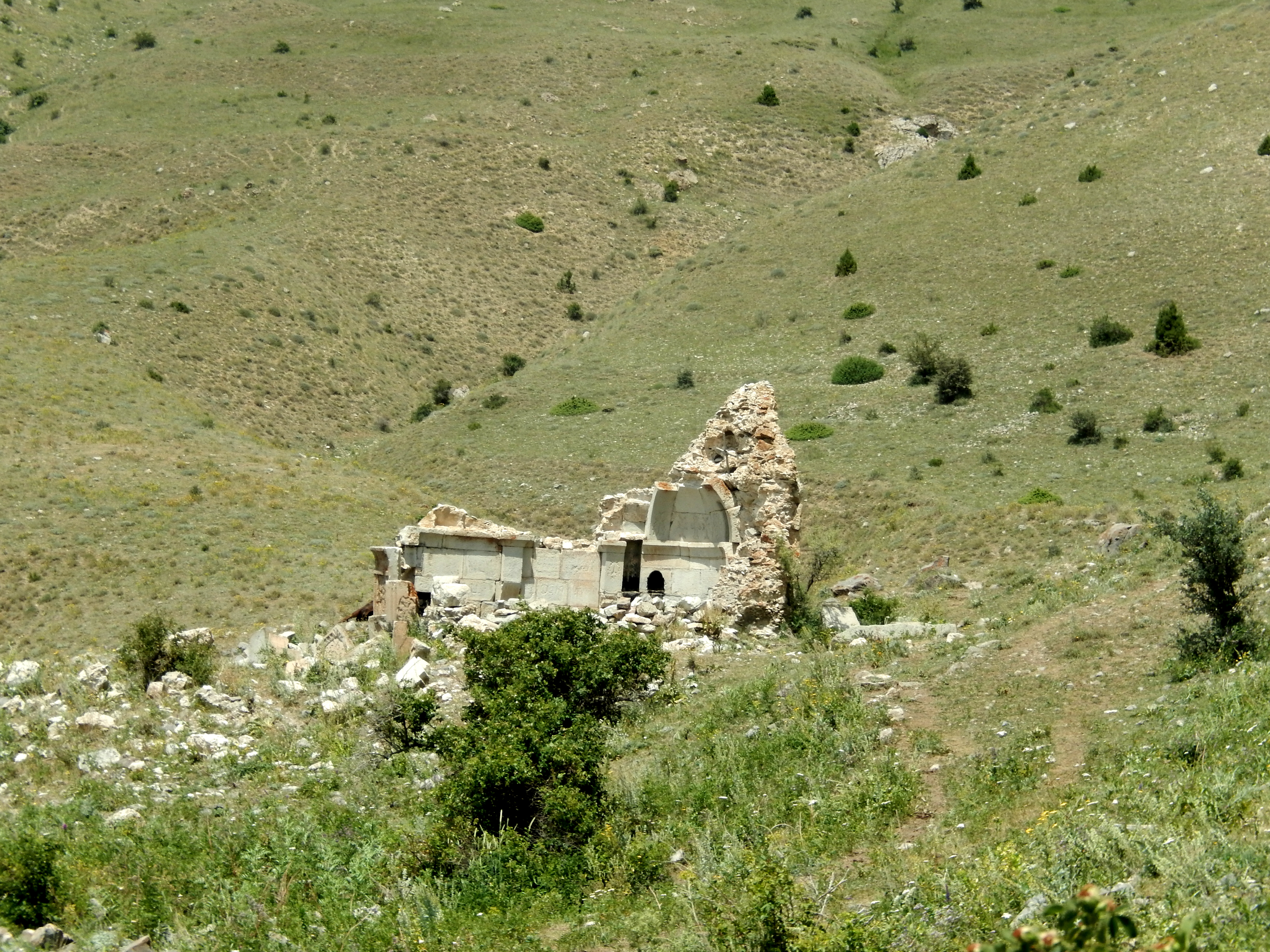 Լանջանիստի «Սպիտակ վանք» եկեղեցի 46/5.1